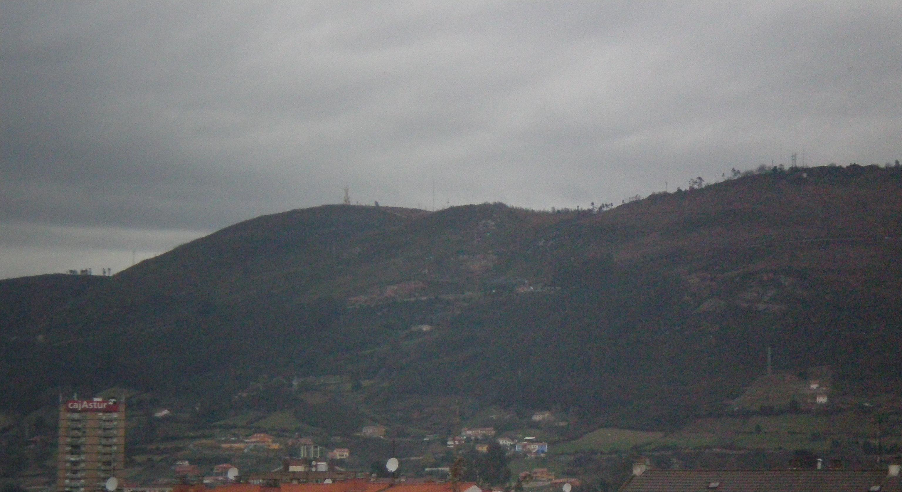 Monte Narancu